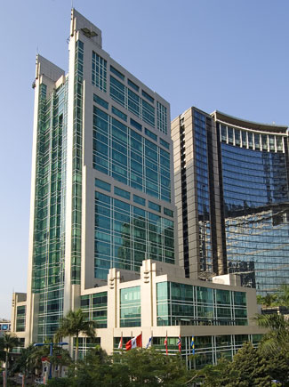 Menara Rajawali di Jakarta